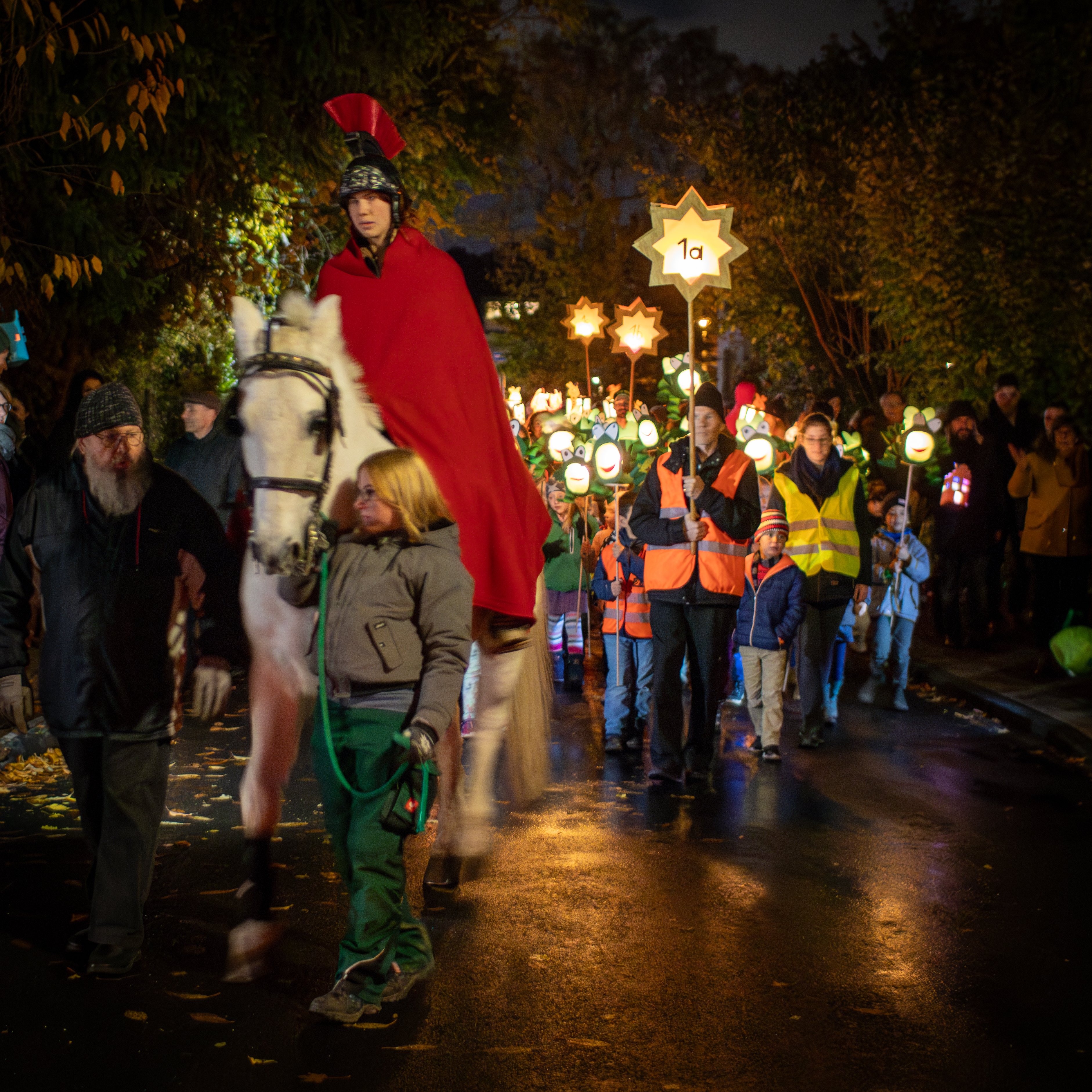 St. Martinszug in Köln-Neuehrenfeld am 10.11.2017